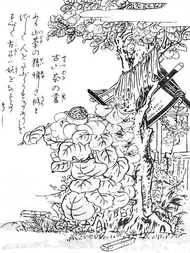 Furutsubaki-no-rei (古山茶の霊) from the Konjaku Gazu Zoku Hyakki (今昔画図続百鬼)